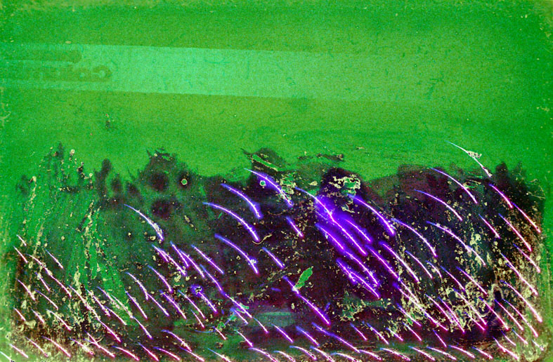 513_1979, bemalte und gekratzte Realaufnahme auf Diapositiv von Nikolaus A. Nessler, 1979